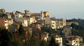 Cesano borgo Cesano di Roma Alberto Molinas